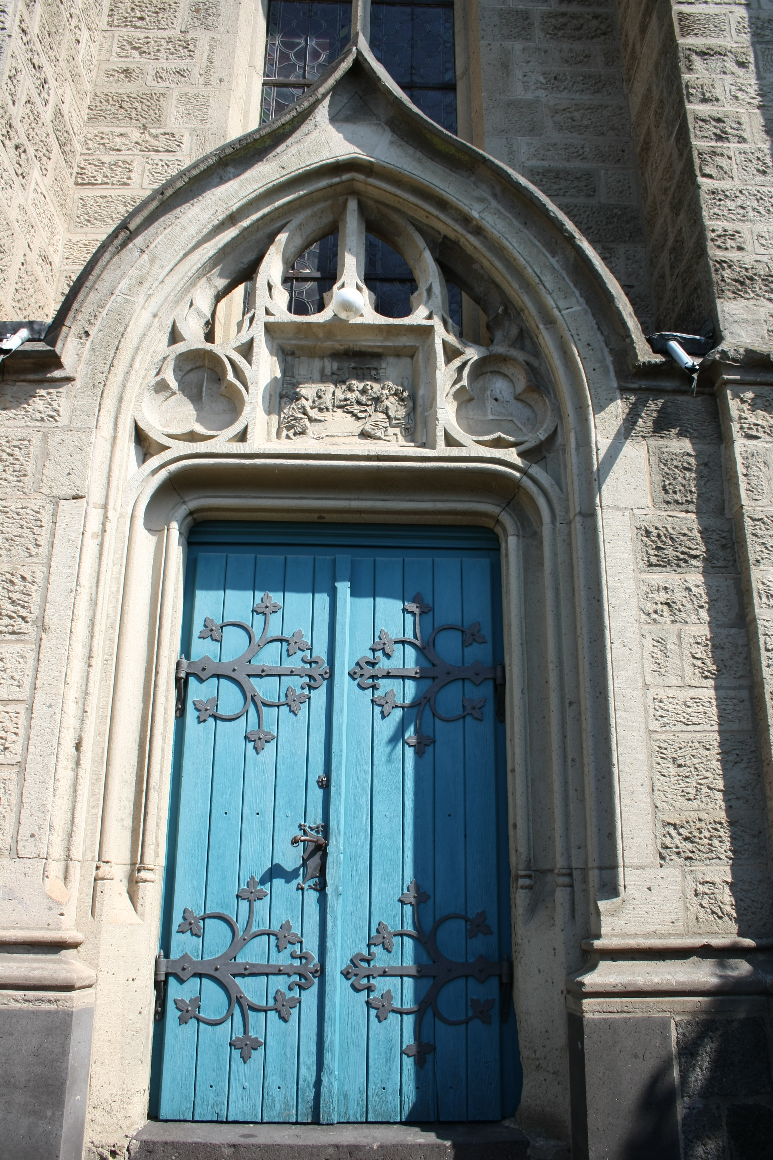 Pfarrkirche St. Philippus und Jakobus in Kempenich, Hauptportal